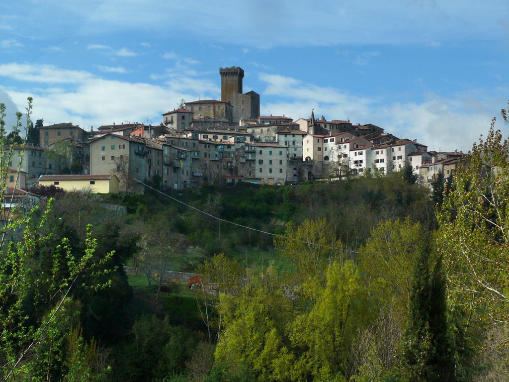 Arcidosso, view